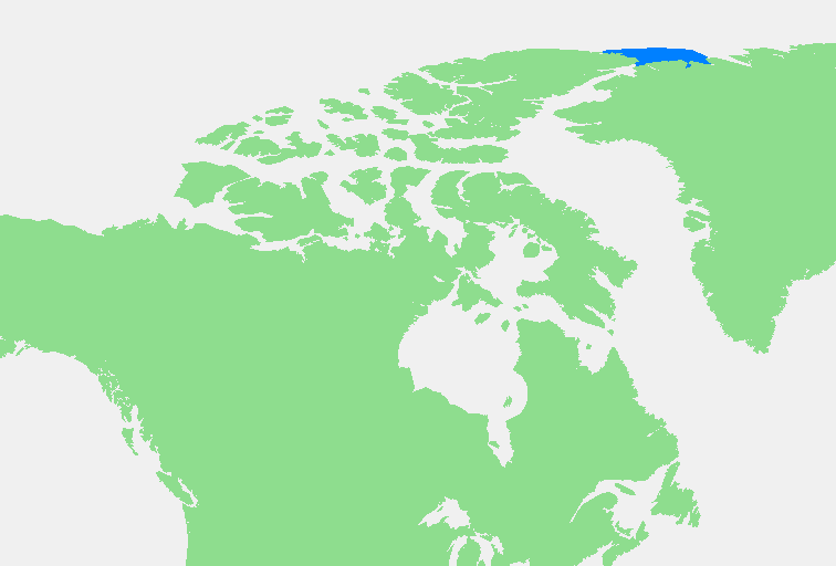 Lincoln Sea.PNG